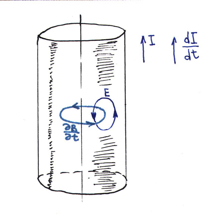 иллюстрация к статье про скин-эффект